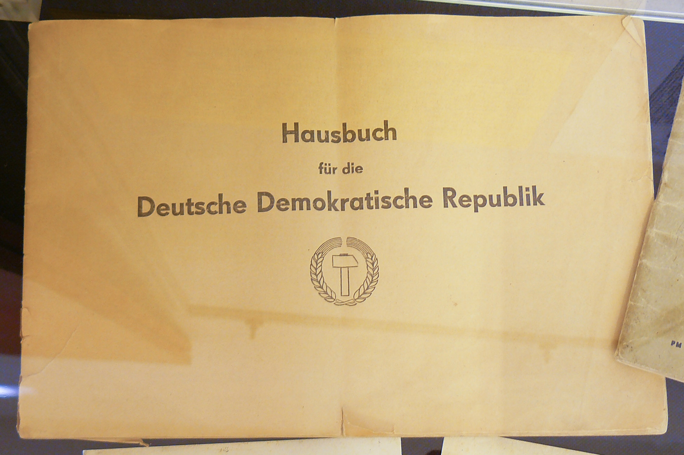 Hausbuch im Stasimuseum Runde Ecke mit altem Staatswappen